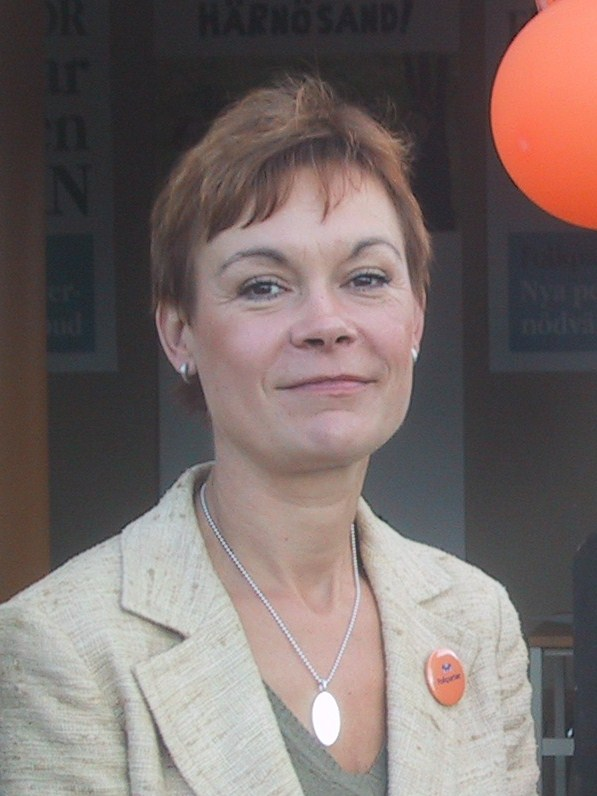 Karin Pilsäter folkpartipolitiker